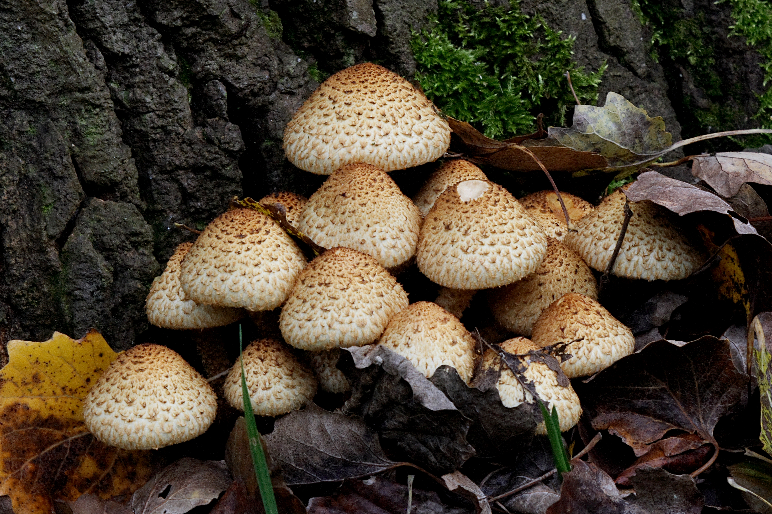 Česky: Trsovitě rostoucí houba vedle bývalého kempu na hrázi Břevského rybníka